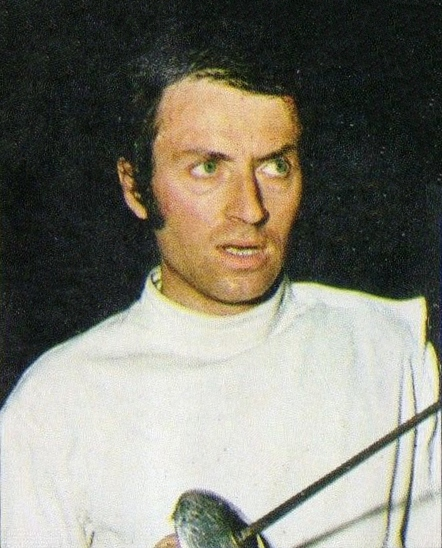 SPORT VEDETTES-PANINI 1974-Figurina n.104- WOYDA - POLONIA -SCHERMA-Rec